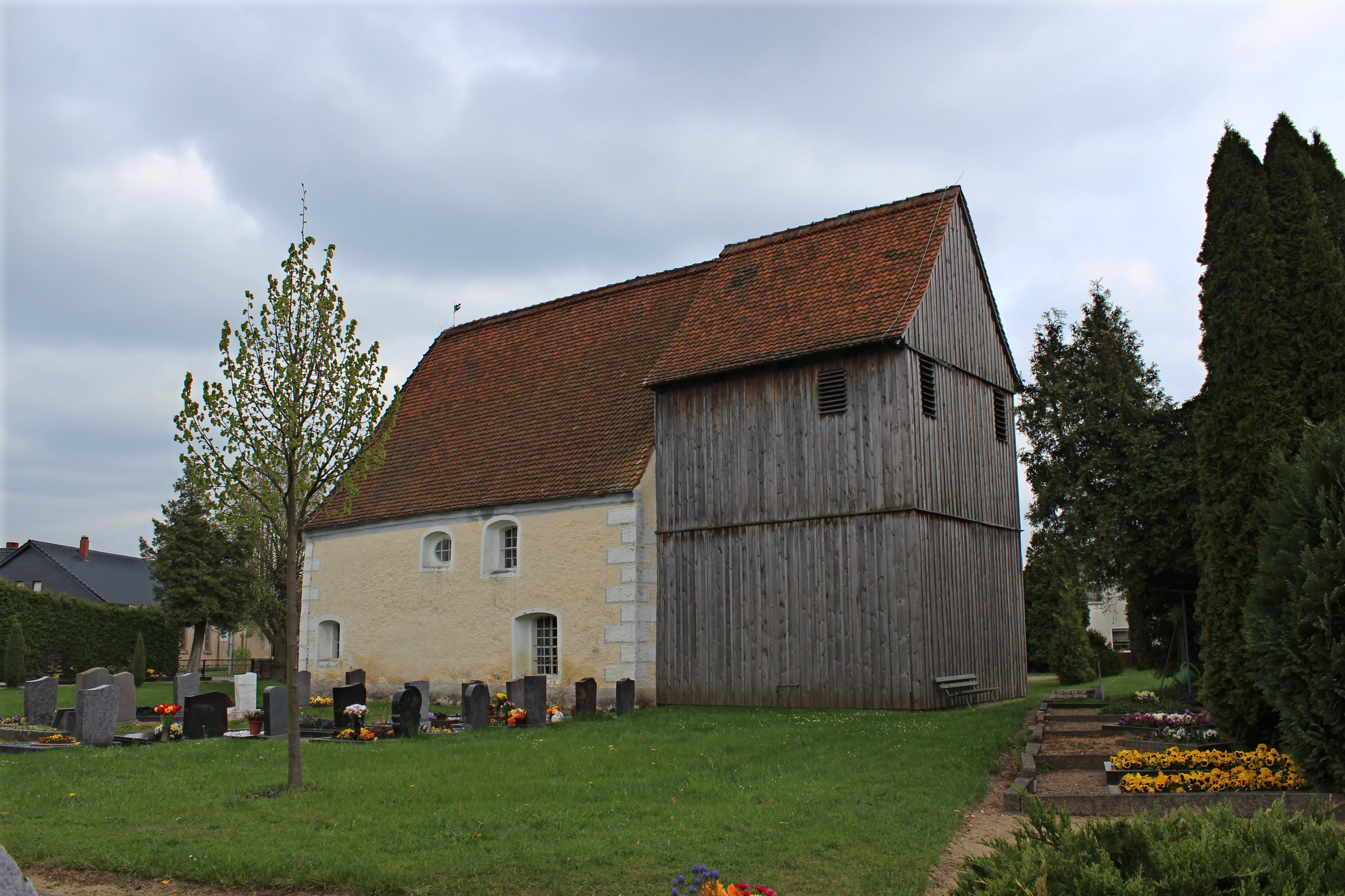 Bönitz.